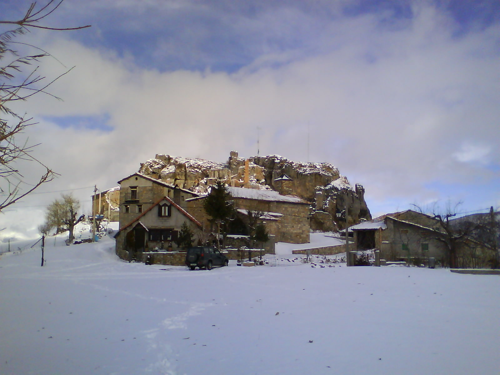 Pueblo de Adons con nieve. (Alta Ribagorça)